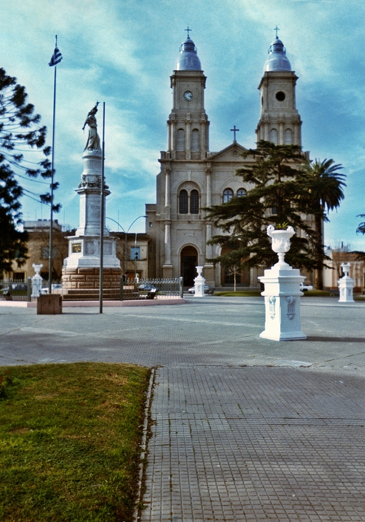 Catedral de Florida, Uruguay